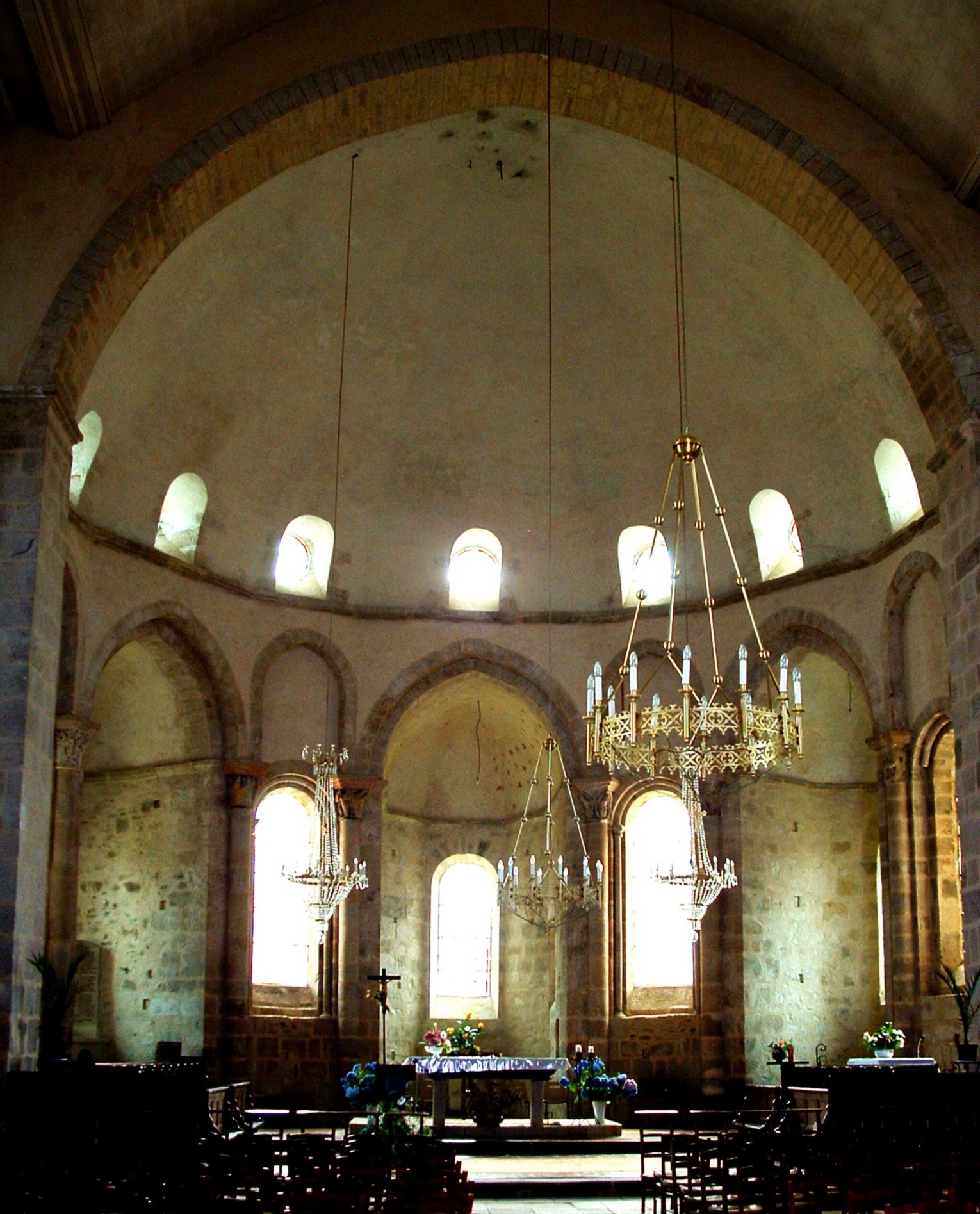 Vigeois - Abbatiale - Abside